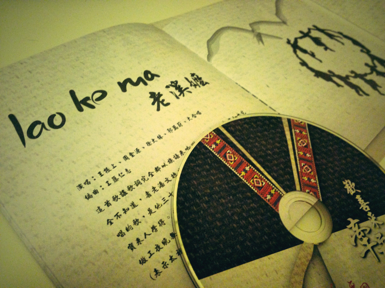 日光小林大滿族人出版的《歡喜來牽戲》中對族語歌《老溪嬤》的介紹。